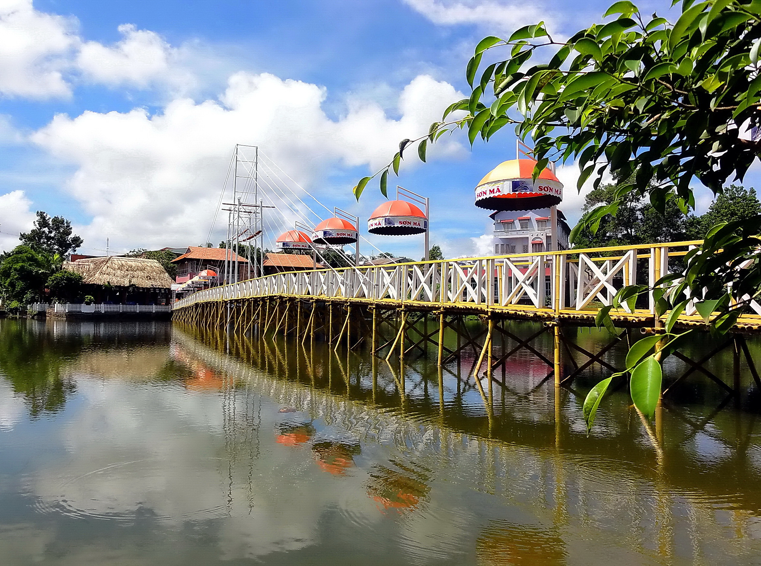 Gia Nghĩa, Đăk Nông, Việt Nam